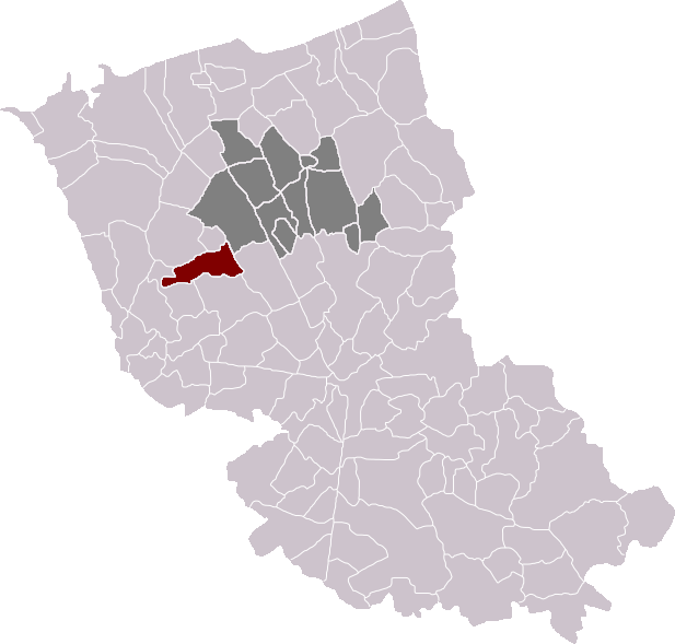 Locatie gemeente Eringem in arrondissement Duinkerke. Zelfgemaakt. Location of Eringhem municipality in the arrondissement of Dunkirk. Self made. Localisation de la commune d'Eringhem dans l'arrondissement de Dunkerque. Fait moi-même.